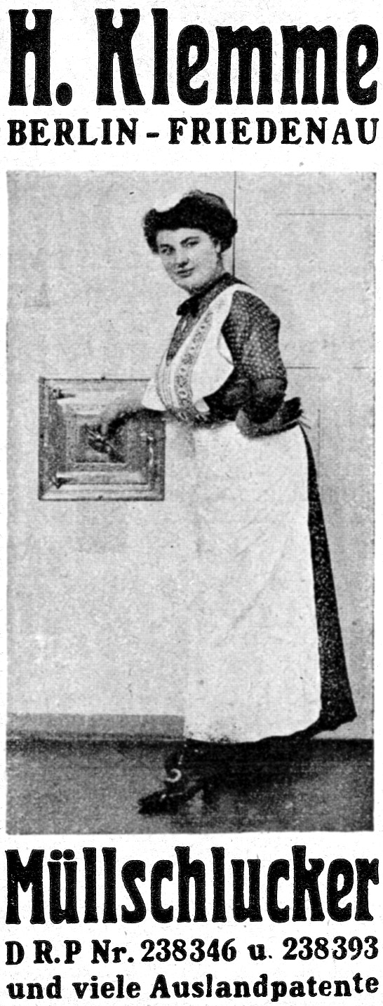 Werbeanzeiger für Müllschlucker von H. Klemme